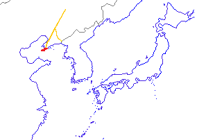 日本が租借した関東州（満鉄付属地を除く）